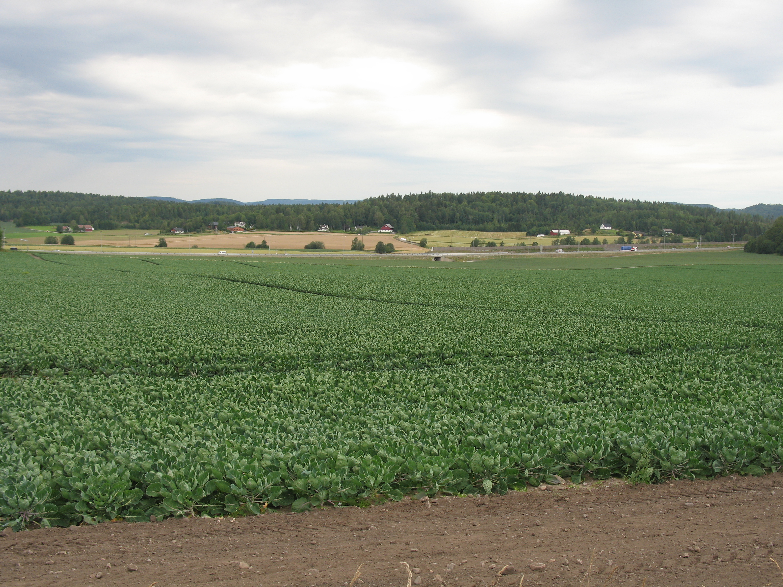 Rosenkåldyrking i Stokke i Vestfold